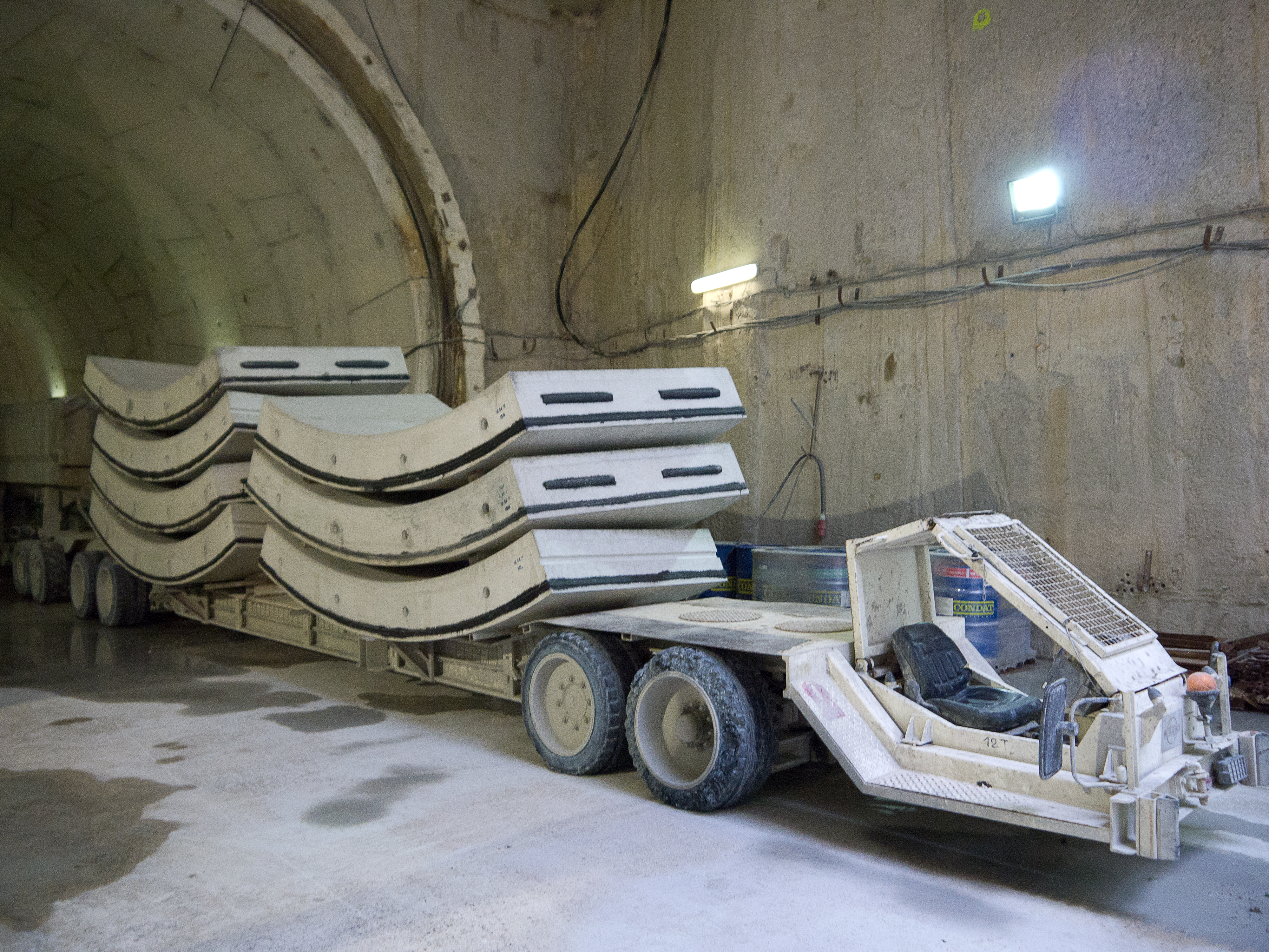 Travaux d'extension de la ligne 12 du métro de Paris à Auberviliers : véhicules qui transportent les voussoirs jusqu'au tunnelier (50 tonnes à la fois).